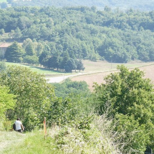 Paysage de Drôme des collines